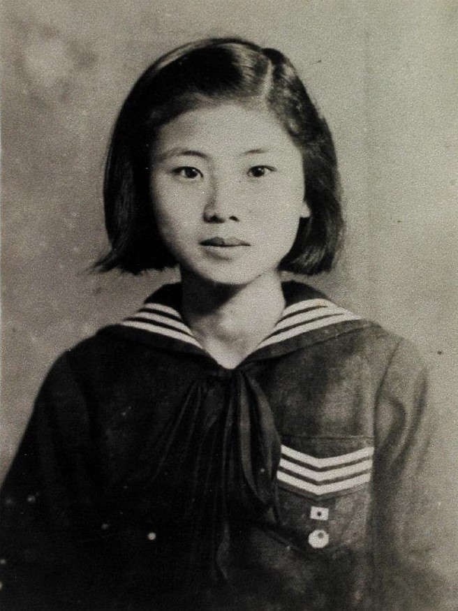 施水環之像